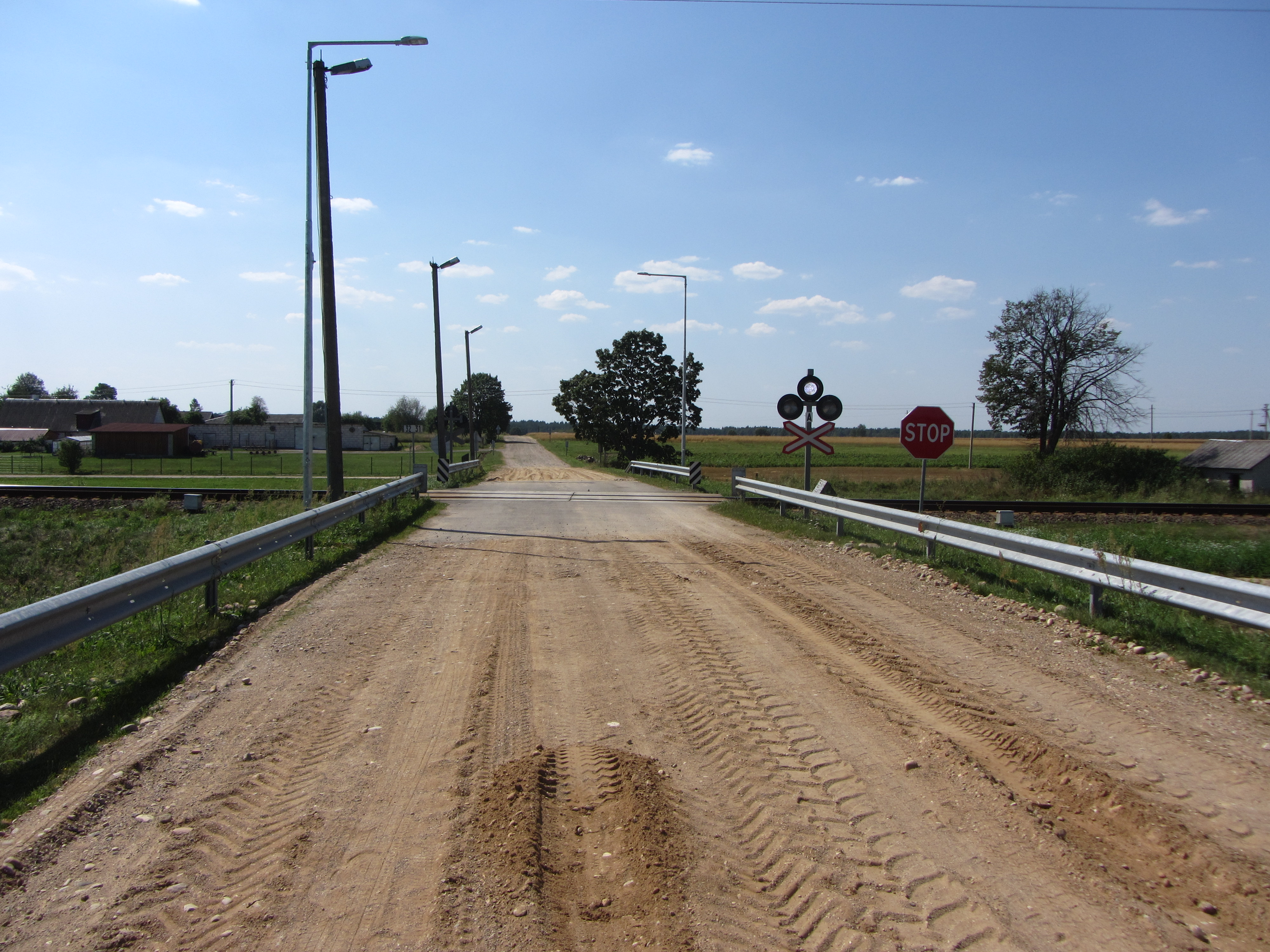 Dainava, Lithuania